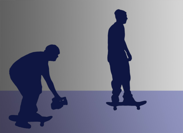 Rullalautailutemput videoidaan yleensä MiniDV-kameralla käsivaralta, usein käytetään myös kalansilmäobjektiivia.